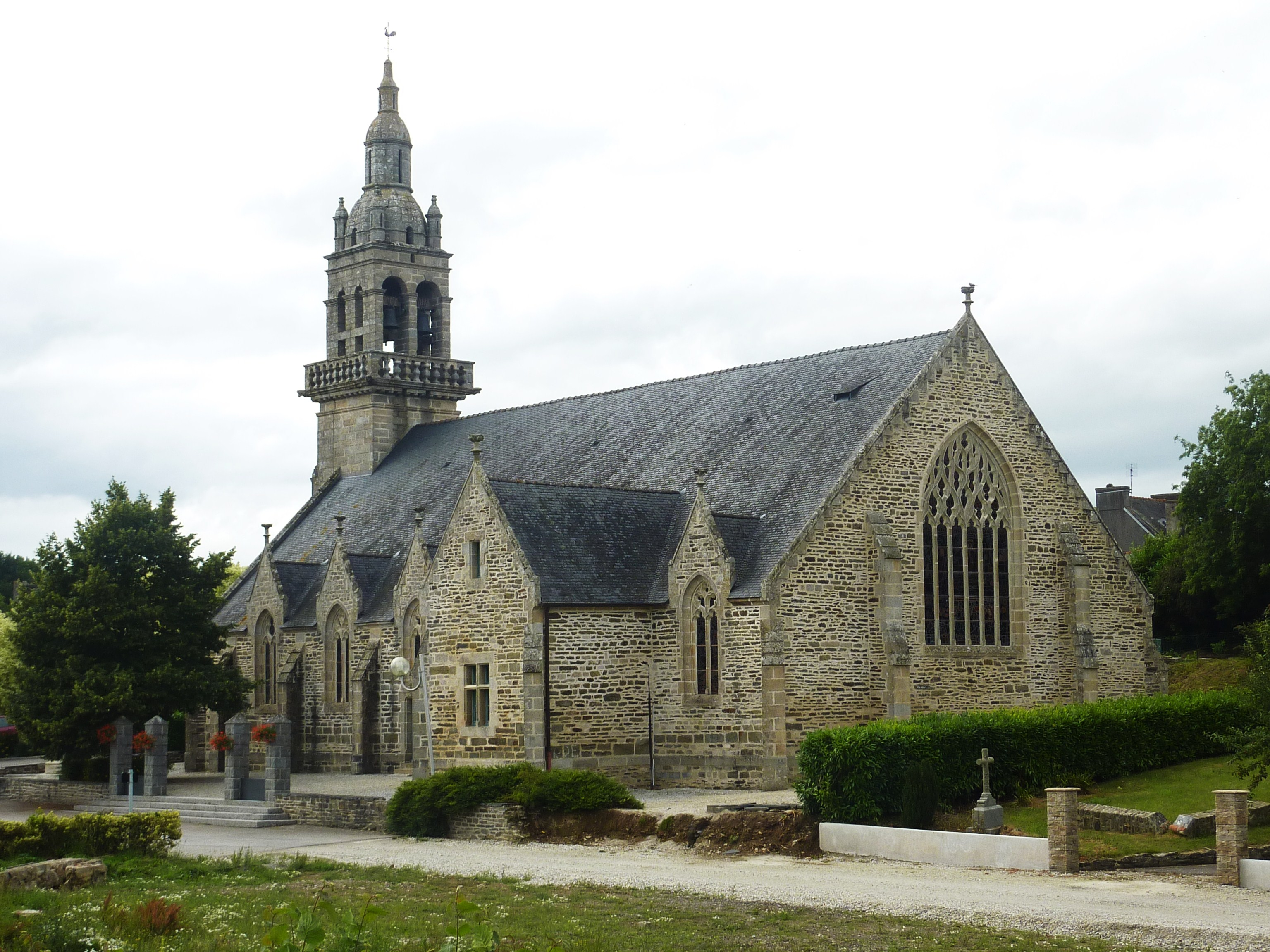 Landeleau : l'église paroissiale autre vue